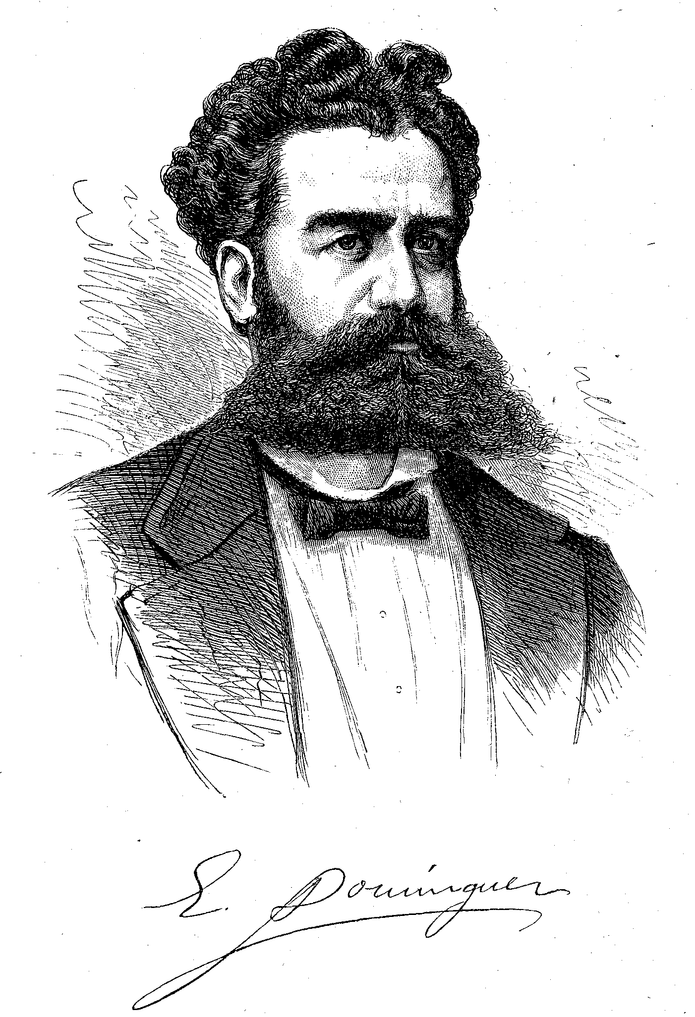 Eduardo Domínguez, grabado publicado en La Ilustración Popular, 16 de abril de 1873